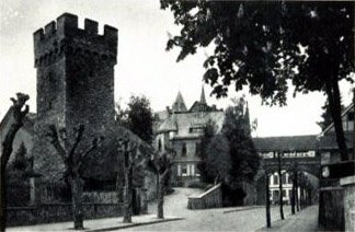 Der Rote Turm der ehemaligen Stadtmauer von Bensheim auf einer Postkarte aus dem Jahr 1904